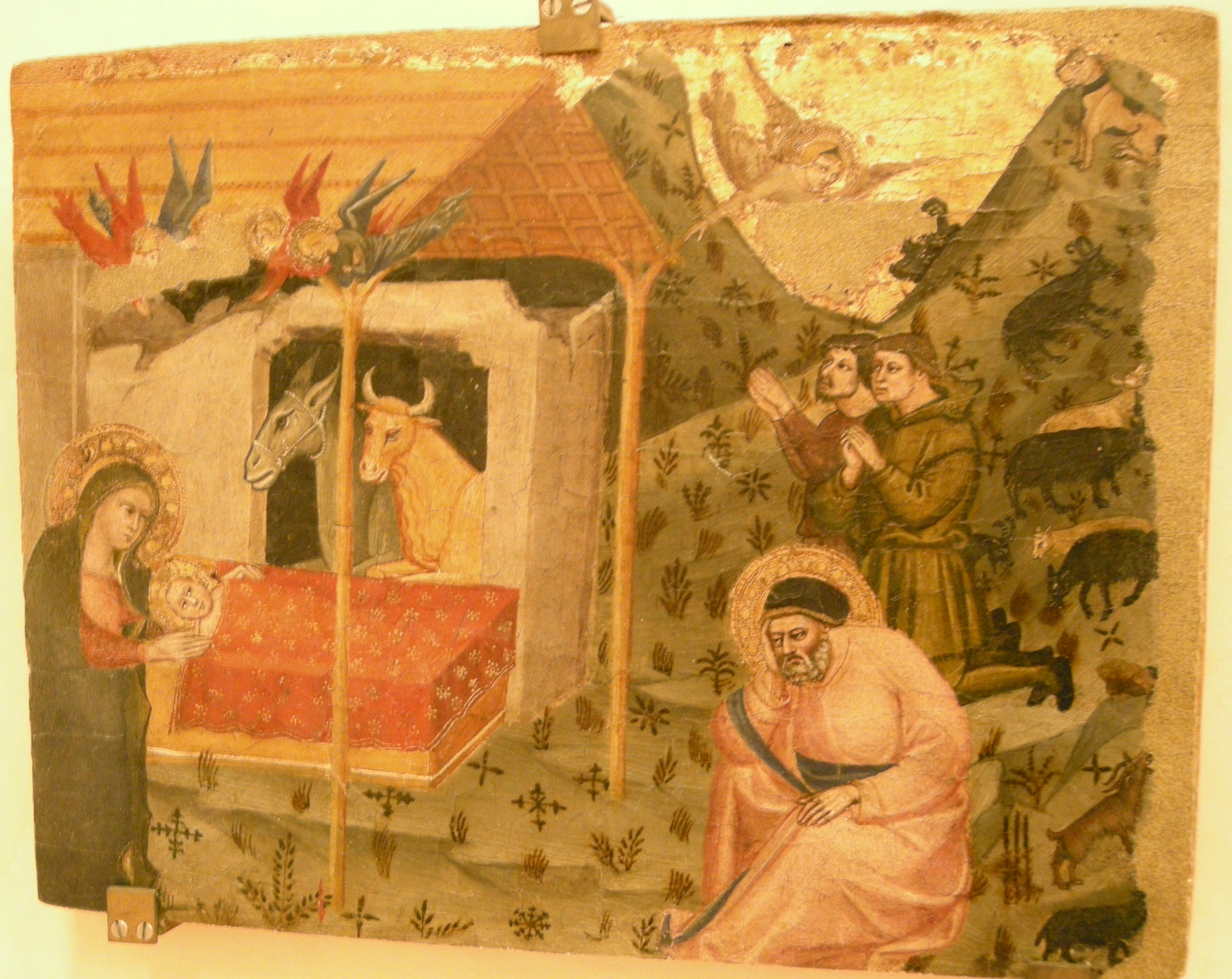 Maestro della predella dell'ashmolean museum, natività 1380-85